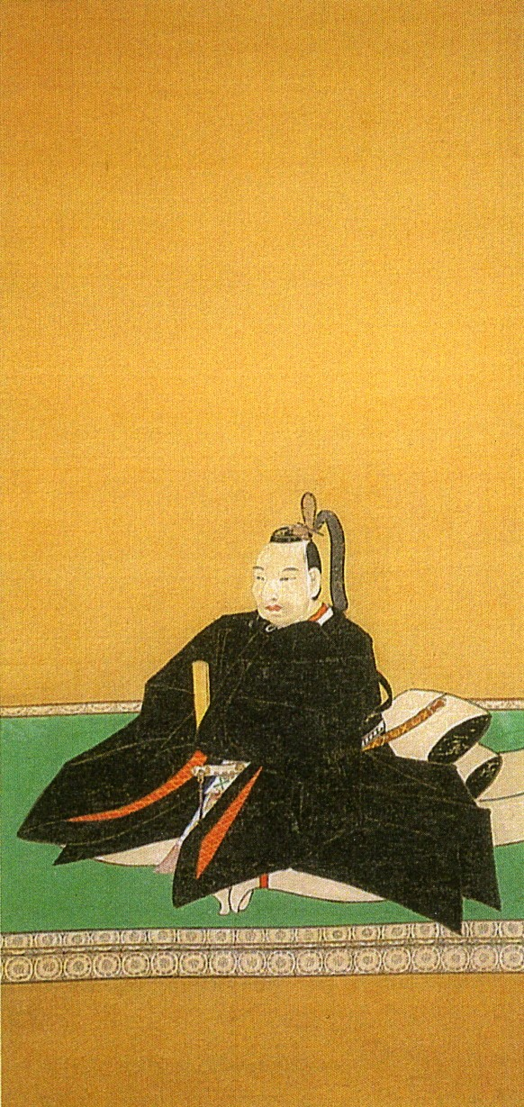 丹羽長貴の肖像画(市指定文化財)。